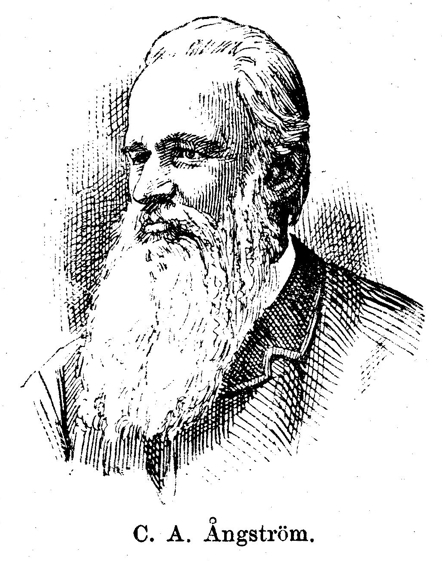 Ångström